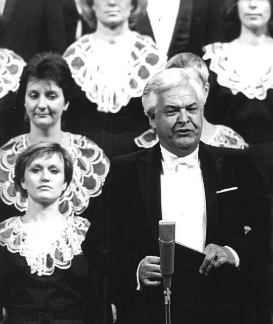 ADN-ZB Link 23.10.87 Berlin: Jubiläum-Staatsakt. Zum Abschluß des festlichen Staatsaktes ertönte Ludwig van Beethovens 9. Sinfonie. Unter den Solisten des Finalsatzes mit der Kantate über Schillers "Ode an die Freude" war u.a. Theo Adam.